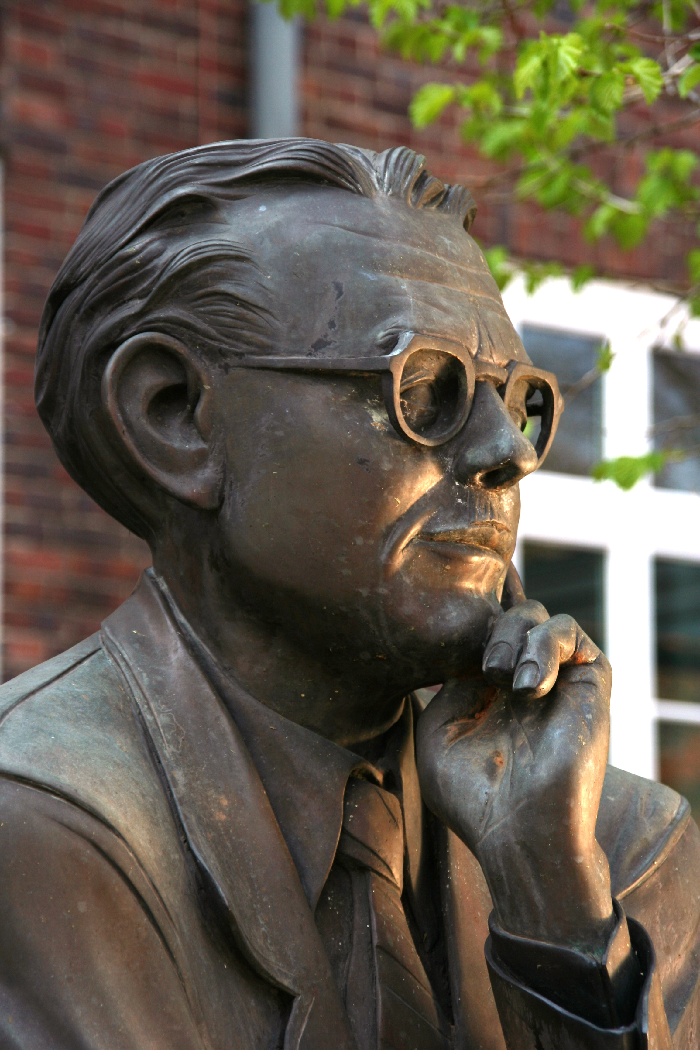 Otto Passarge, Skulptur von Josef Wieczorek